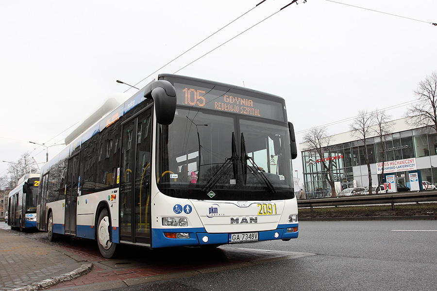 Jeden z nowszych autobusów z Gdyni (2015)